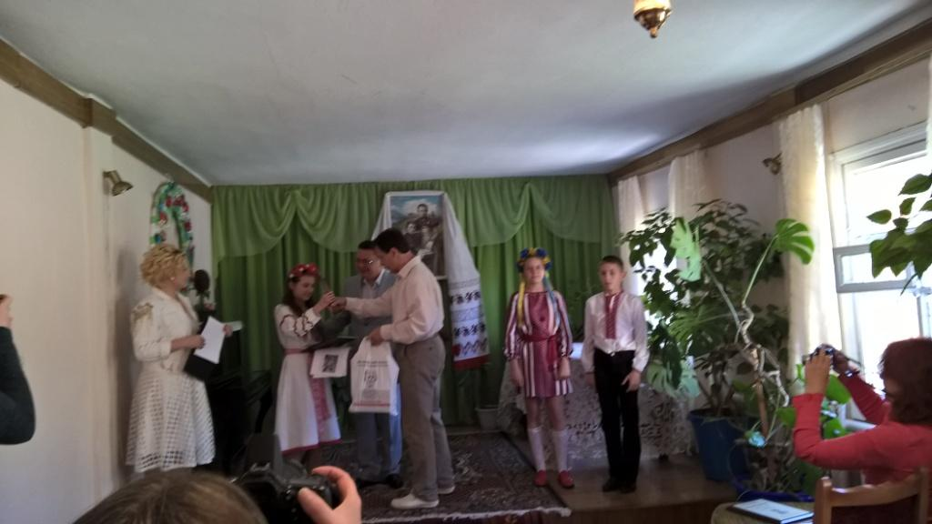 місто Новоград Волинський, травень 2017